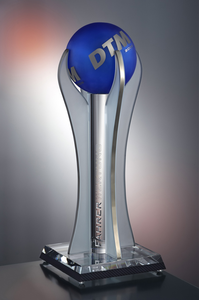 Joska Kristall DTM-Pokal